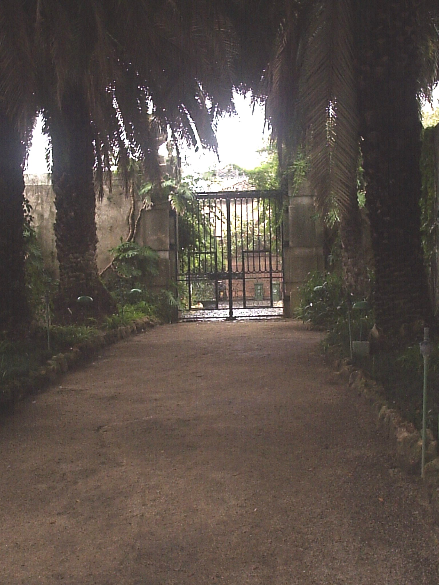 Categoria:Palácio do Monteiro-Mor O Jardim Botânico na Quinta do Monteiro-Mor